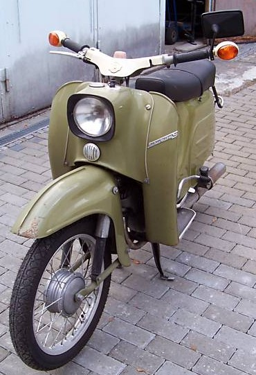 Schwalbe KR51/1 S Halbautomatik original von 1975 ohne Kupplungshebel